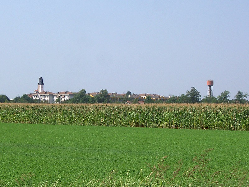 Panorama di Bellinzago Lombardo